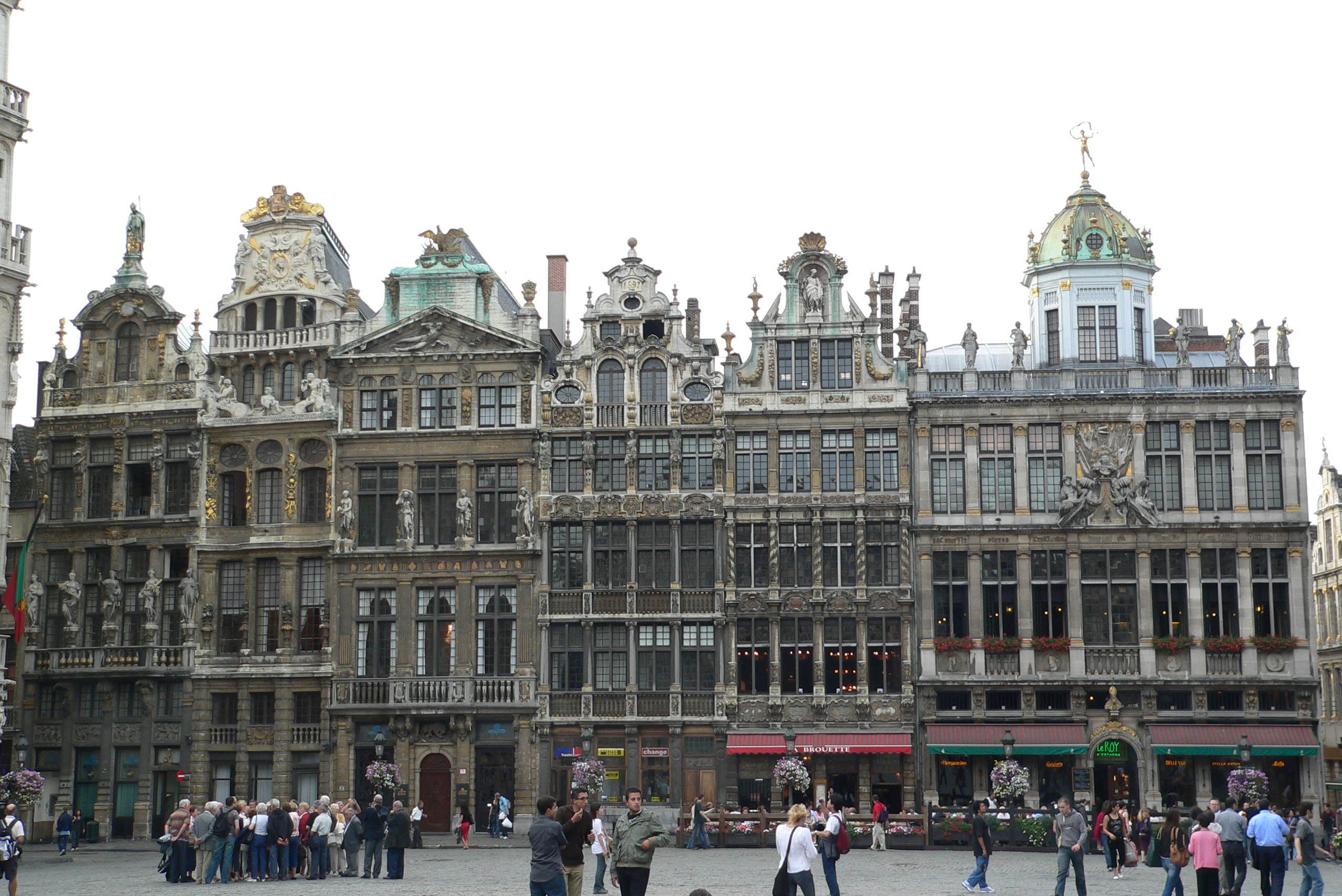 Nordwest-Seite des Grand Place in Brüssel - Belgien, Häuser Nr. 1 bis 7